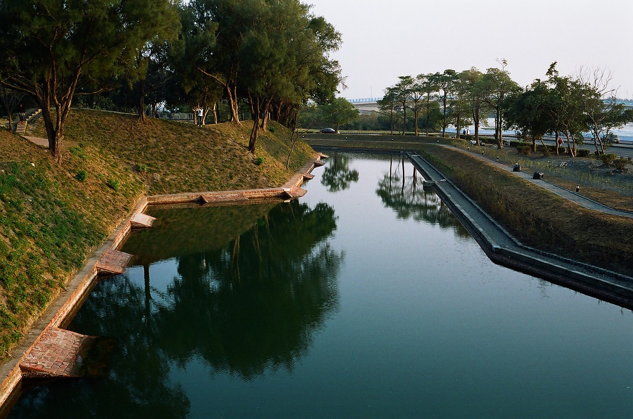 二鯤鯓砲臺護城河。